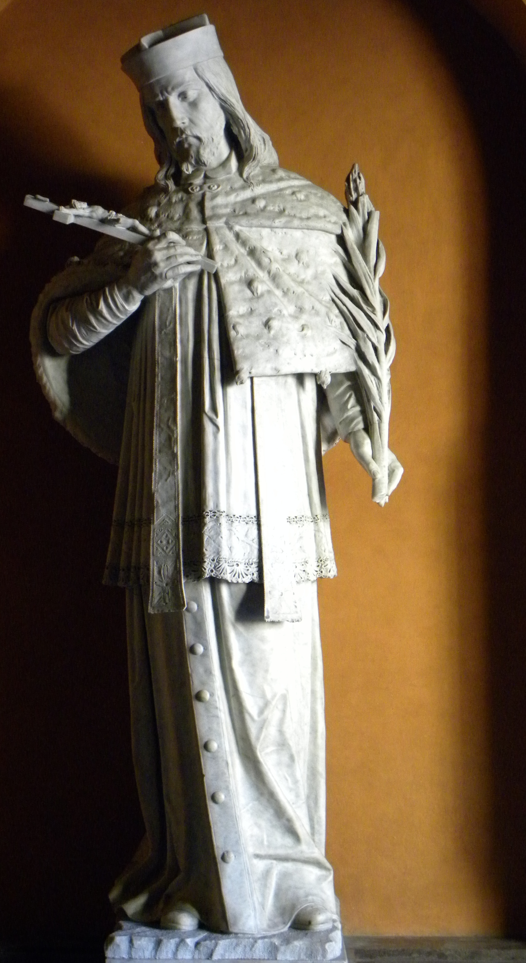 św. Jan Nepomucen w głównej kruchcie katedry w Bielsku_Białej